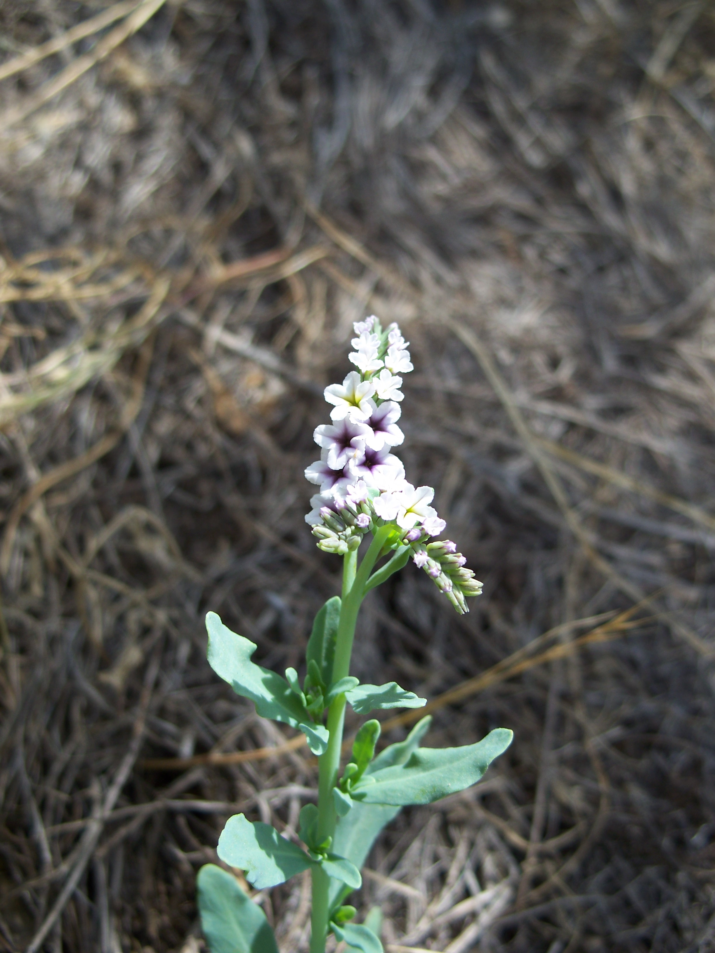 Heliotropium europaeum Made in Almaden Quicksilver County Park, San Jose, California, USA. Identified by Aroche.